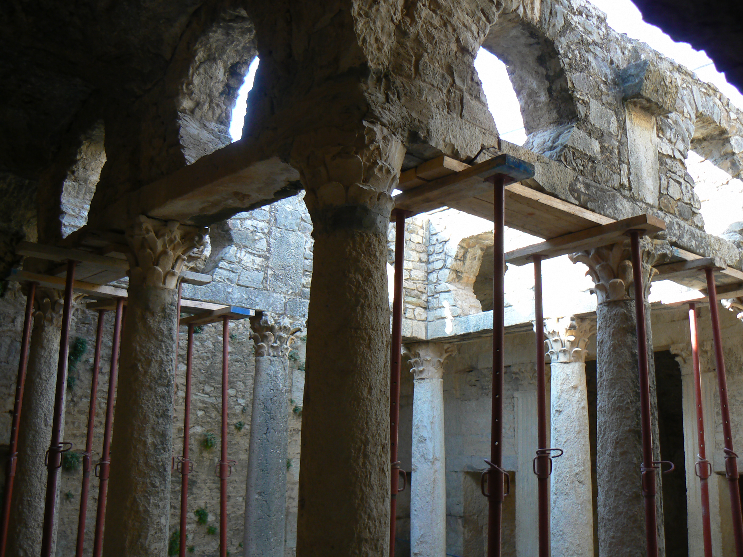 Etage souterrain de la villa de la chasse, Bulla Regia